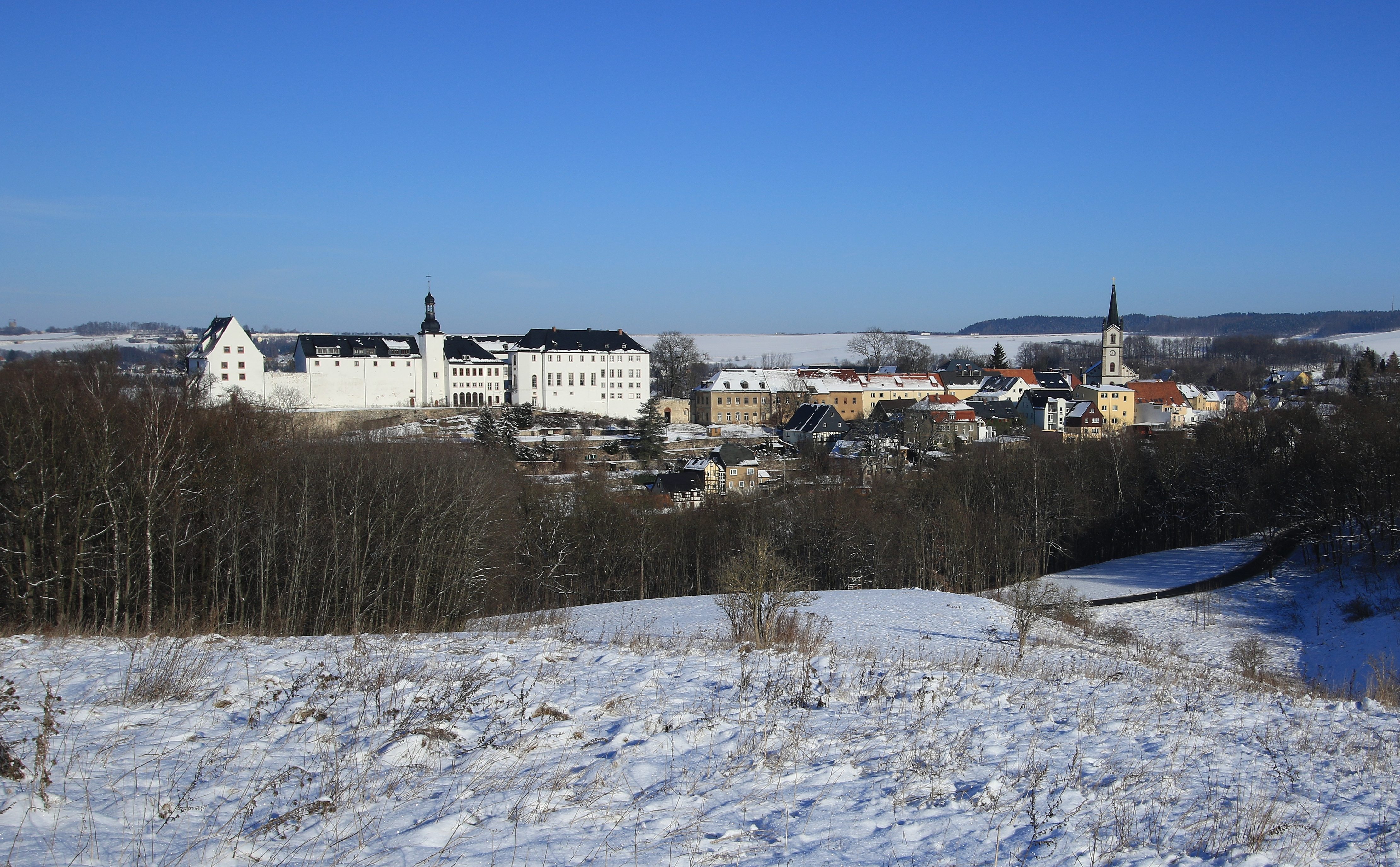 Schloss Wildenwels in Sachsen.